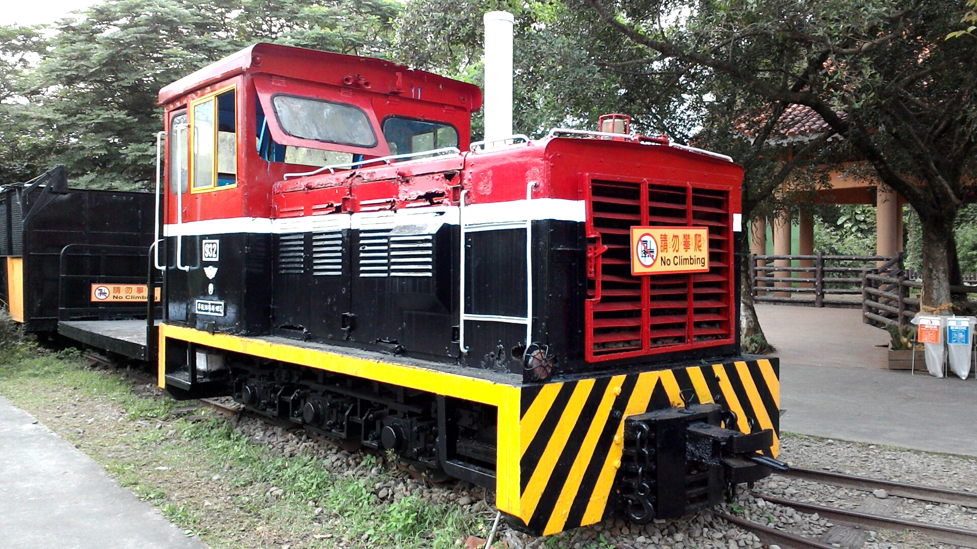 台北市立動物園內展示的932號溪州牌內燃機車,台北市文山區二格山次分區萬興里